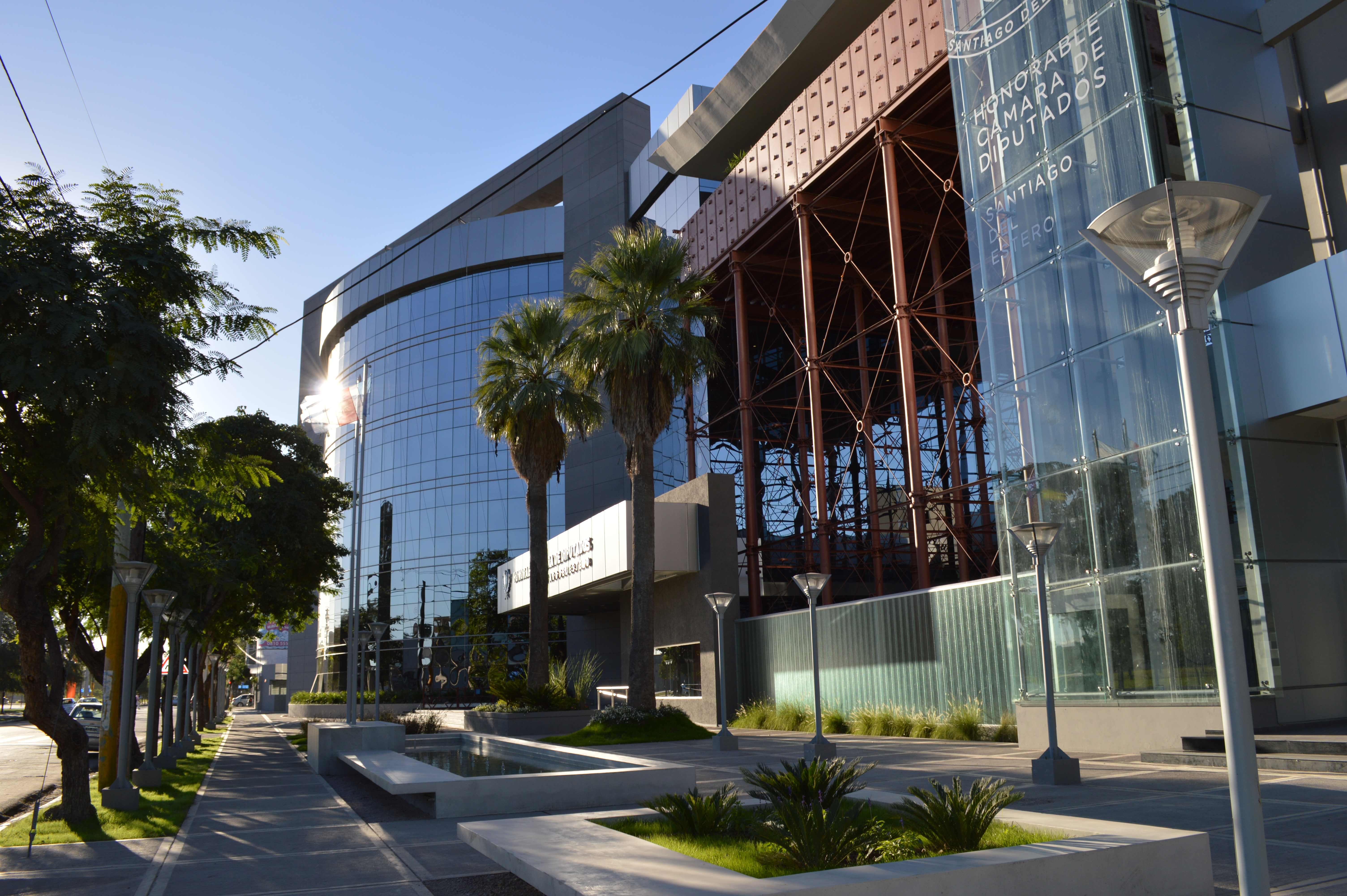 Nuevo Edificio del Poder Legislativo de la Provincia de Santiago del Estero, Argentina.